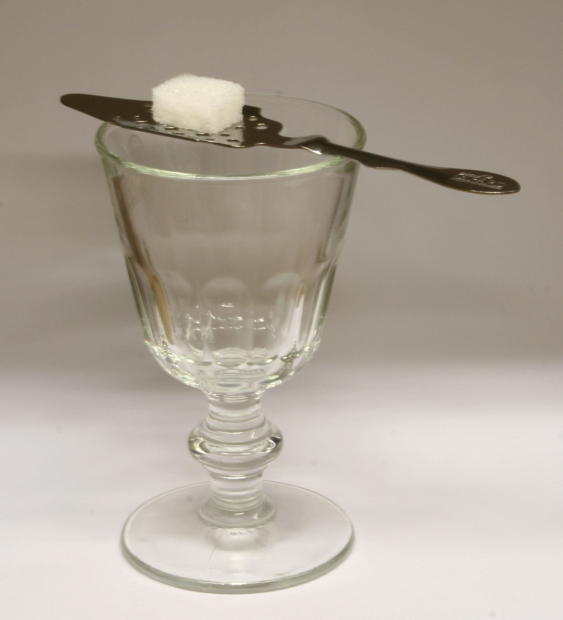 Absinth-Glas